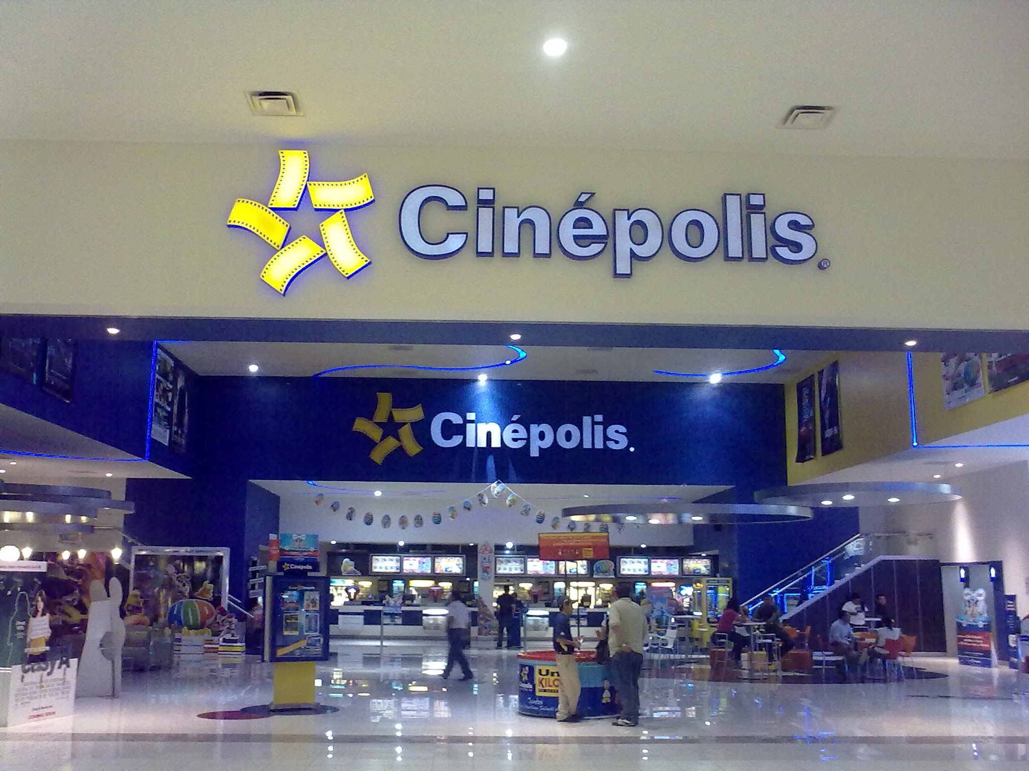 Cinepolis Sendero Ecatepec, Estado de mexico